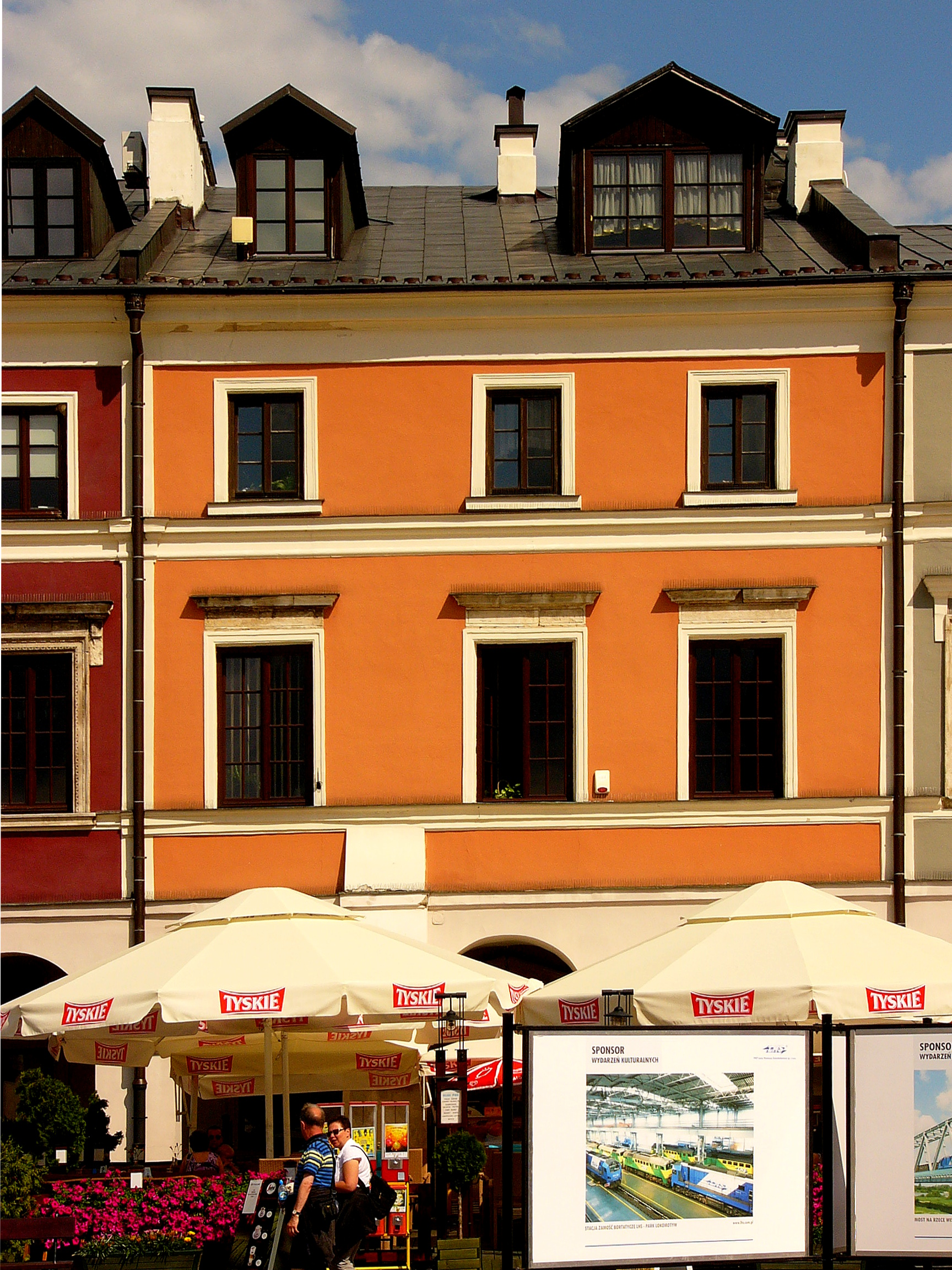 Zamość, Kamienica "Abrekowska" (z oficyną) (1 ćw. XVII w.)